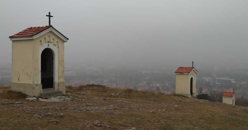 KALVÁRIA